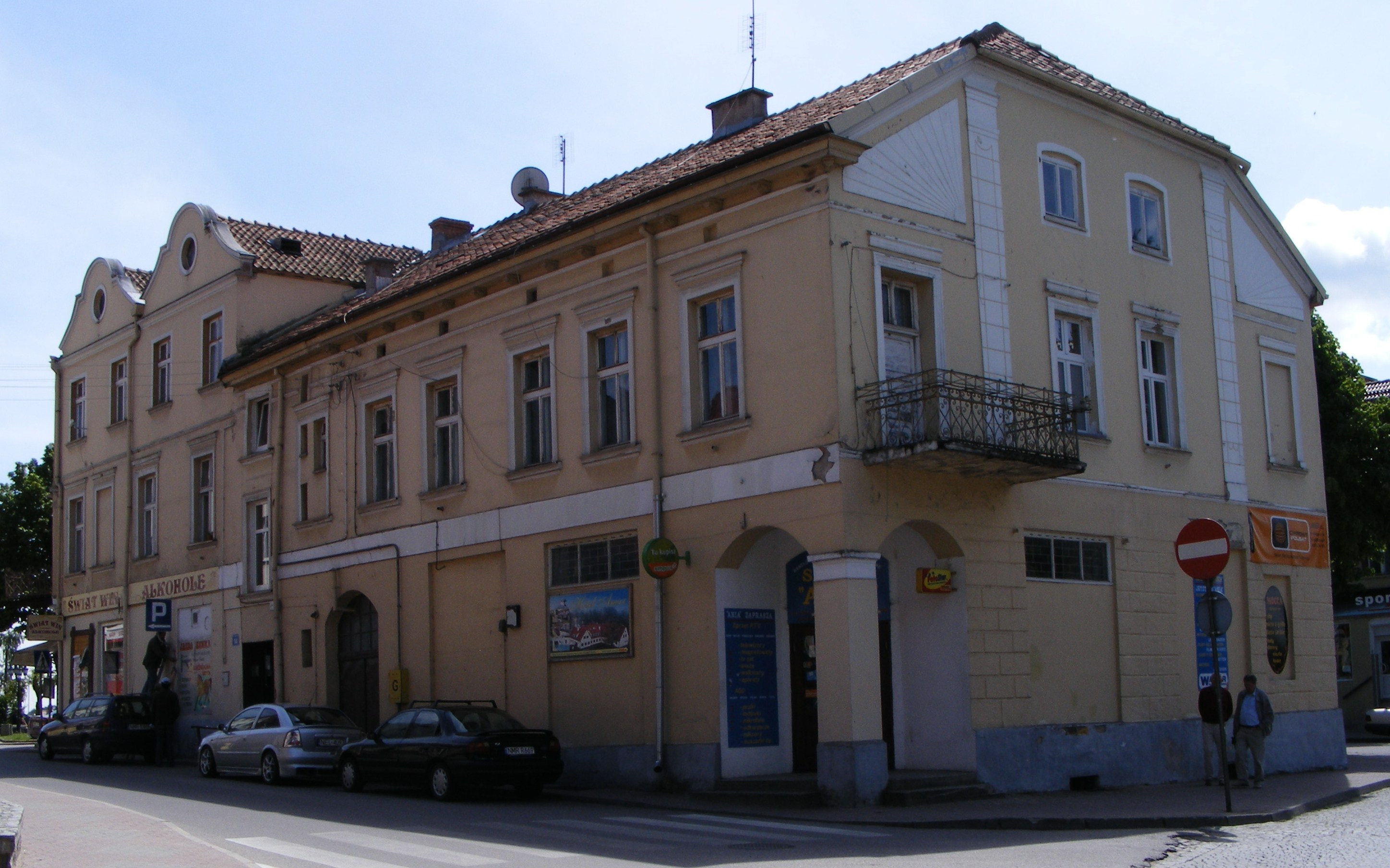 Mikołajki - pl. Wolności 14, sklepy w starej kamienicy.